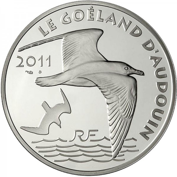 Une pièce de 10 euros en argent a été frappée en 2011 par La Monnaie de Paris sur le Goéland de Audouin